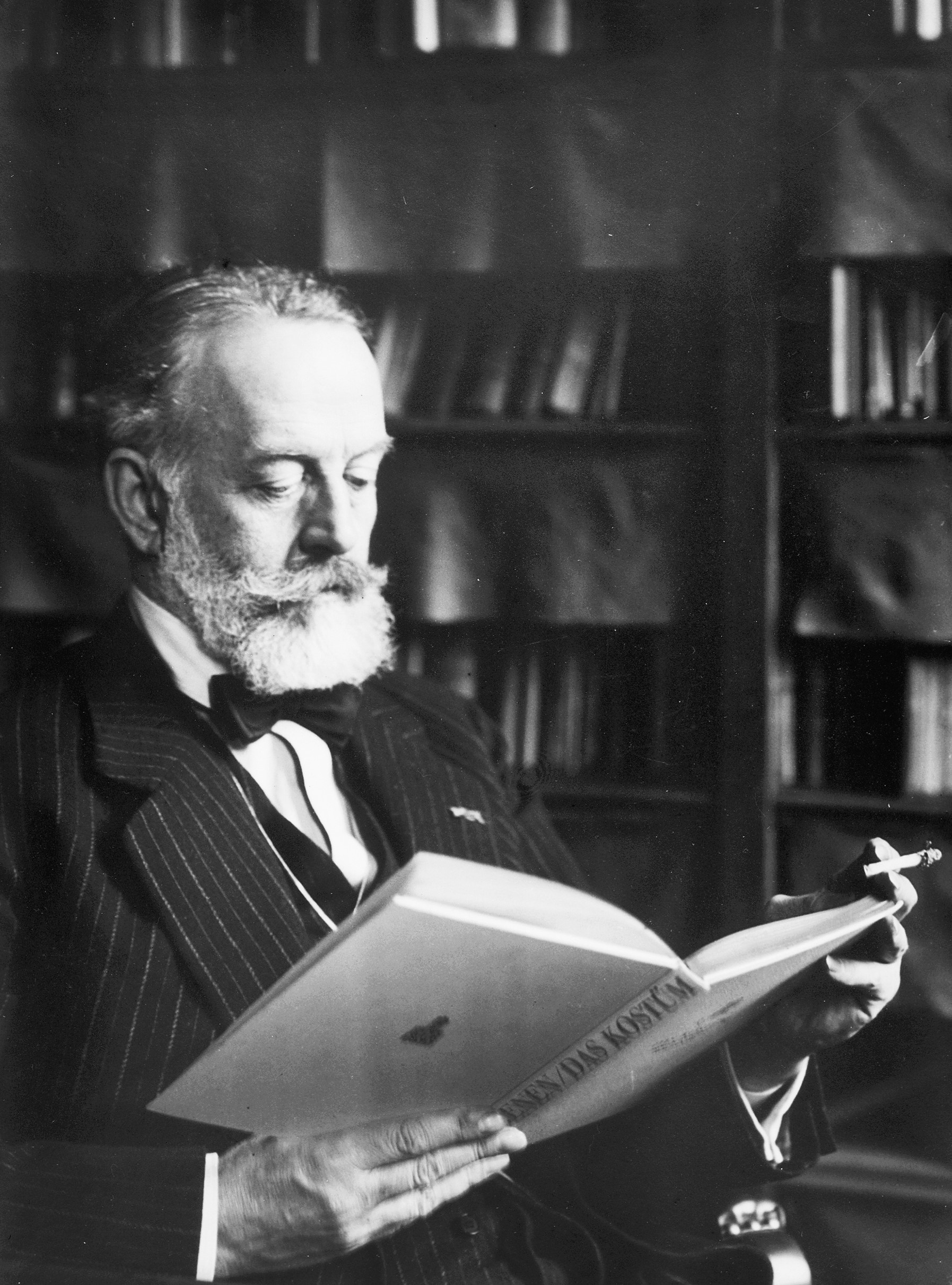 Foto van Dr. J. Kalf: Directeur van monumentenzorg